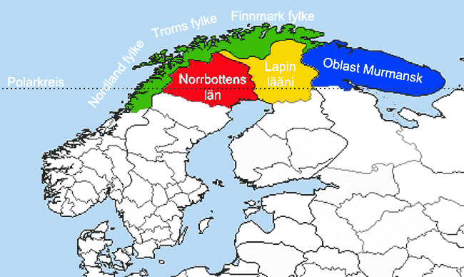 Region Nordkalotte mit Provinzgrenzen der beteiligten Länder